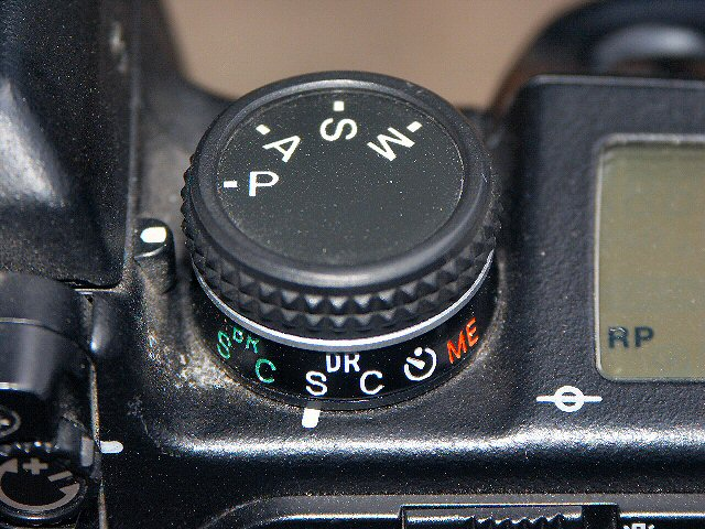 Motiv: Minolta Dynax 9 - Einstellrad für Belichtungsfunktion Aufnahmedatum: 23-Aug-2004 Fotografiert mit: Minolta Dimage 7 Hi